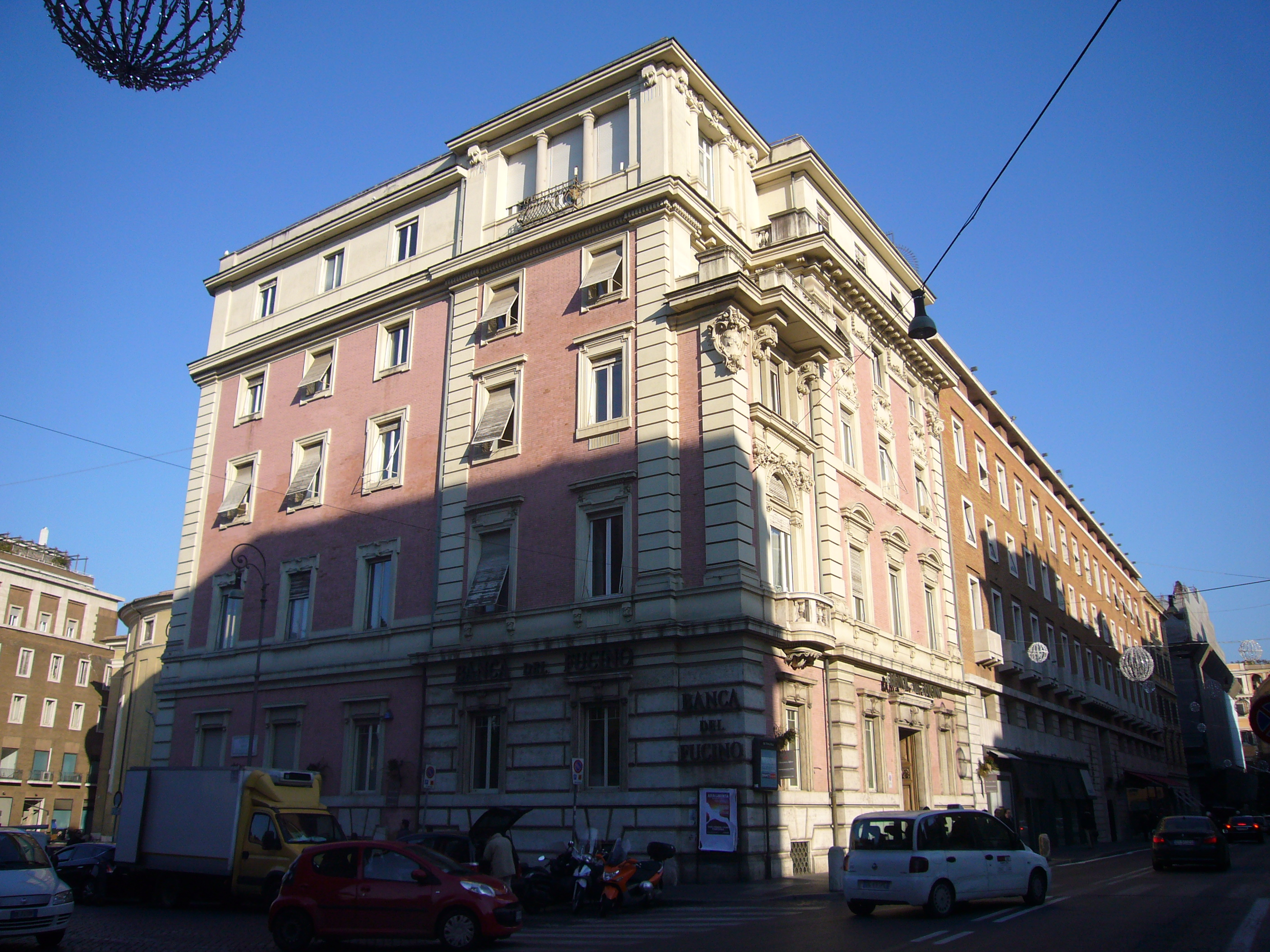 Roma, palazzetto Torlonia a via Tomacelli (Gustavo Giovannoni, 1908-9)